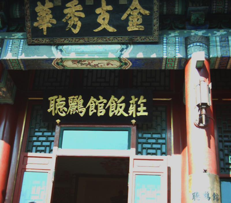 Listening_Oriole_Restaurant 颐和园听鹂馆